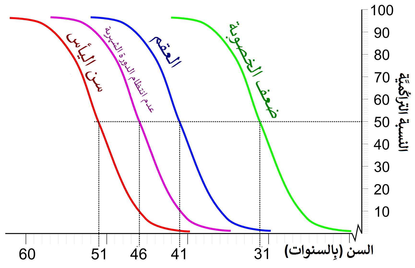 العُمر وخُصُوبة الأُنثى